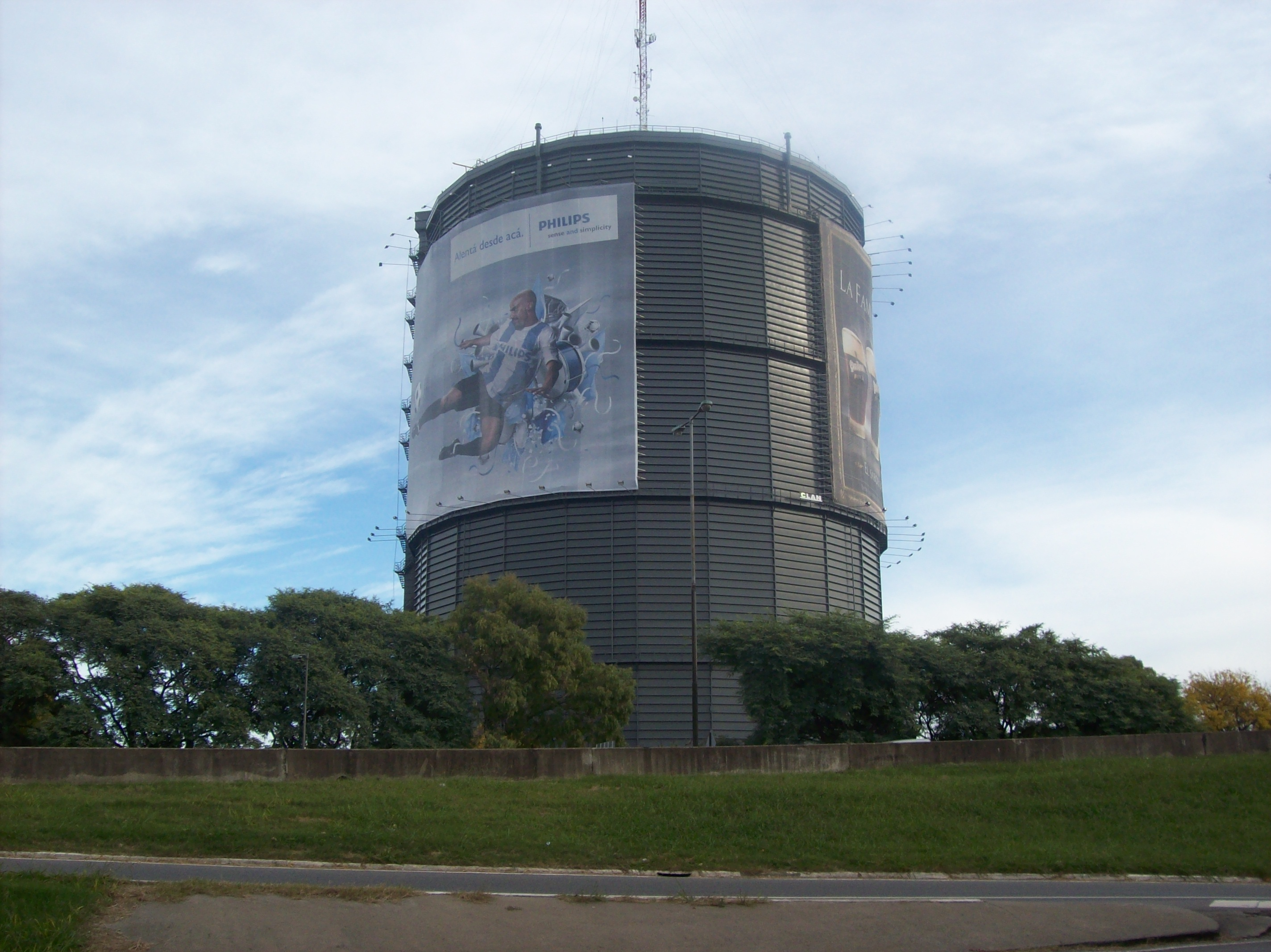 Gasómetro sin uso junto a la Avenida General Paz, en la localidad de Villa Maipú, partido de San Martín, provincia de Buenos Aires, Argentina.